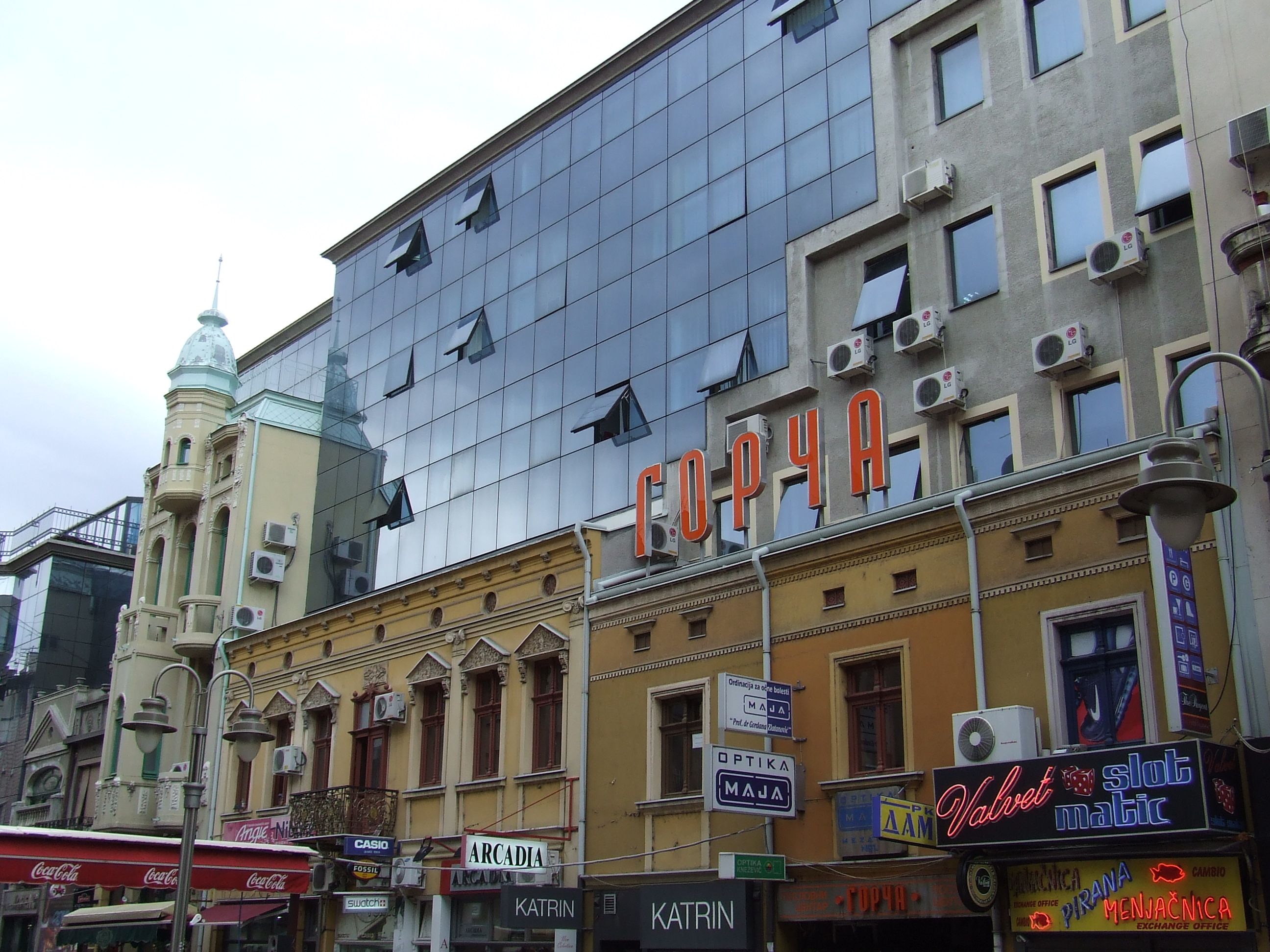 ТЦ Горча у центру Ниша. Фебруар 2010.